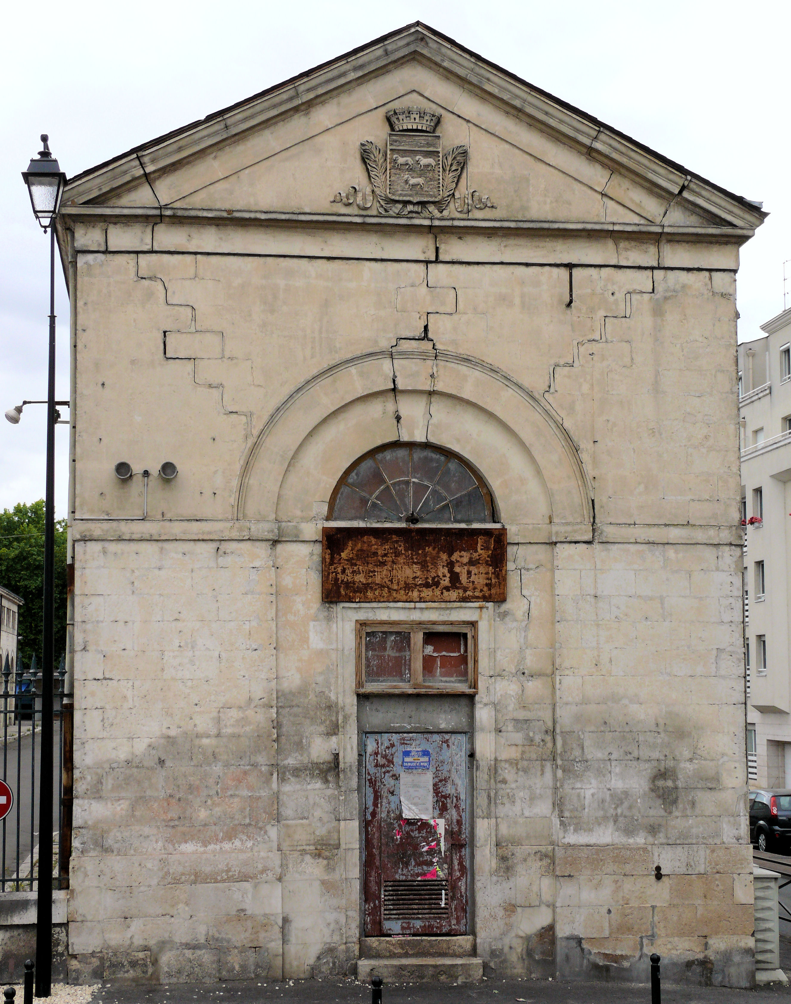 Bourges - Halle au blé - Pavillon d'entrée